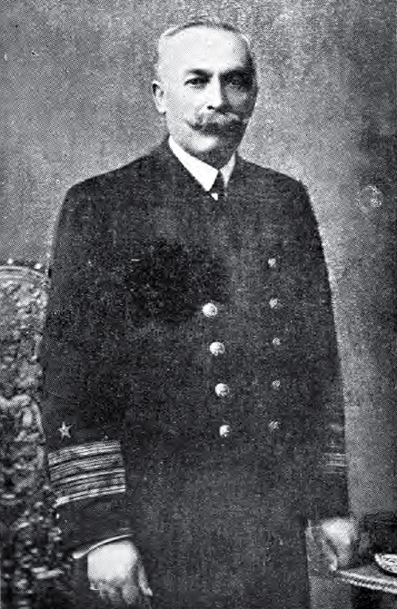 Luis Uribe Orrego (*Copiapó, Chile, 13 de agosto de 1847 - † Valparaíso, Chile, 17 de julio de 1914), marino chileno.